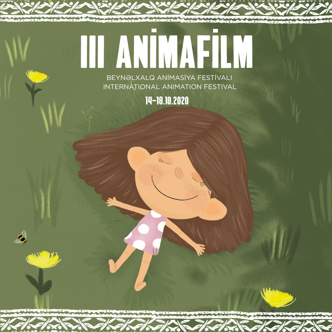 III Animafilm (2020) posteri